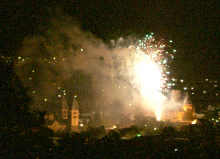 Mayen Feuerwerk zu Lukasmarkt